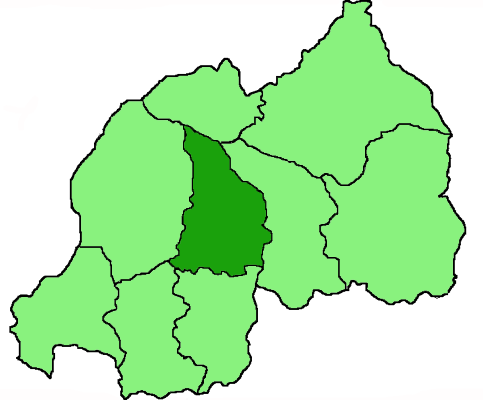 Mappa della diocesi cattolica di Kabgayi, in Ruanda. Anno 2009.